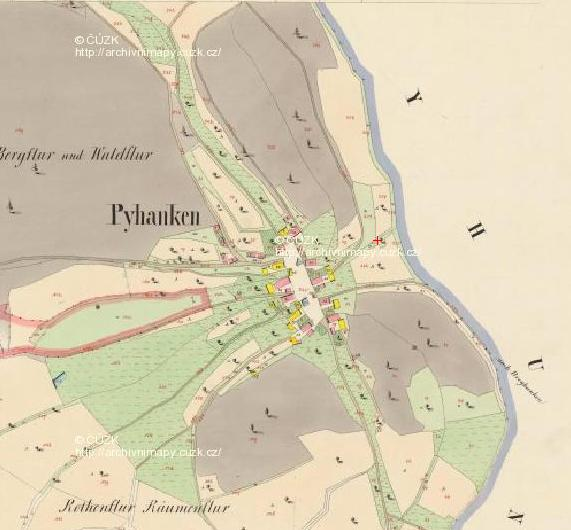 Běhánky - Dubí na katastrální mapě z 19. století.